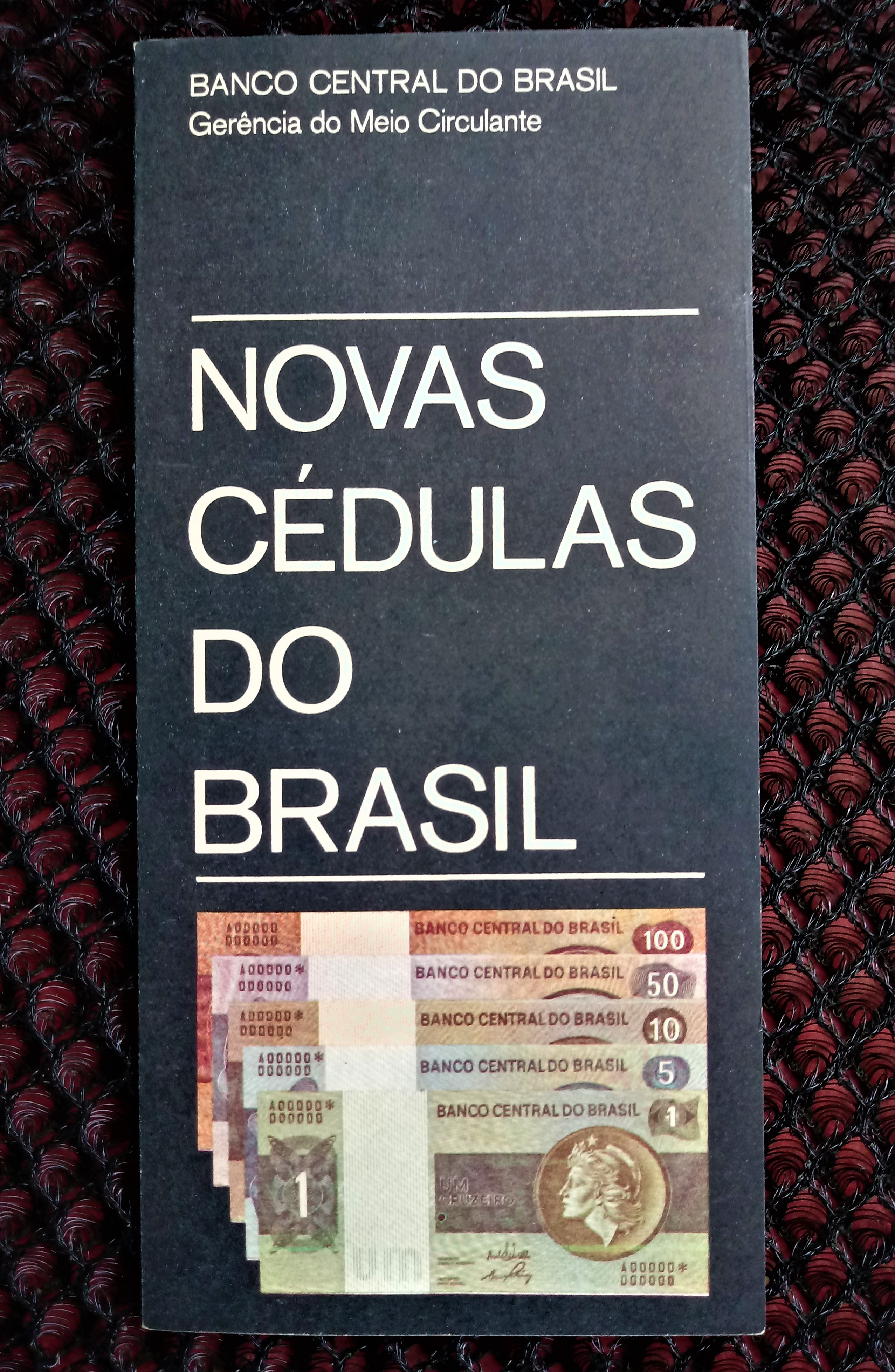 Folder do Banco Central do Brasil, de 1970, que mostra as novas cédulas do Cruzeiro desenhadas por Aloísio Magalhães.